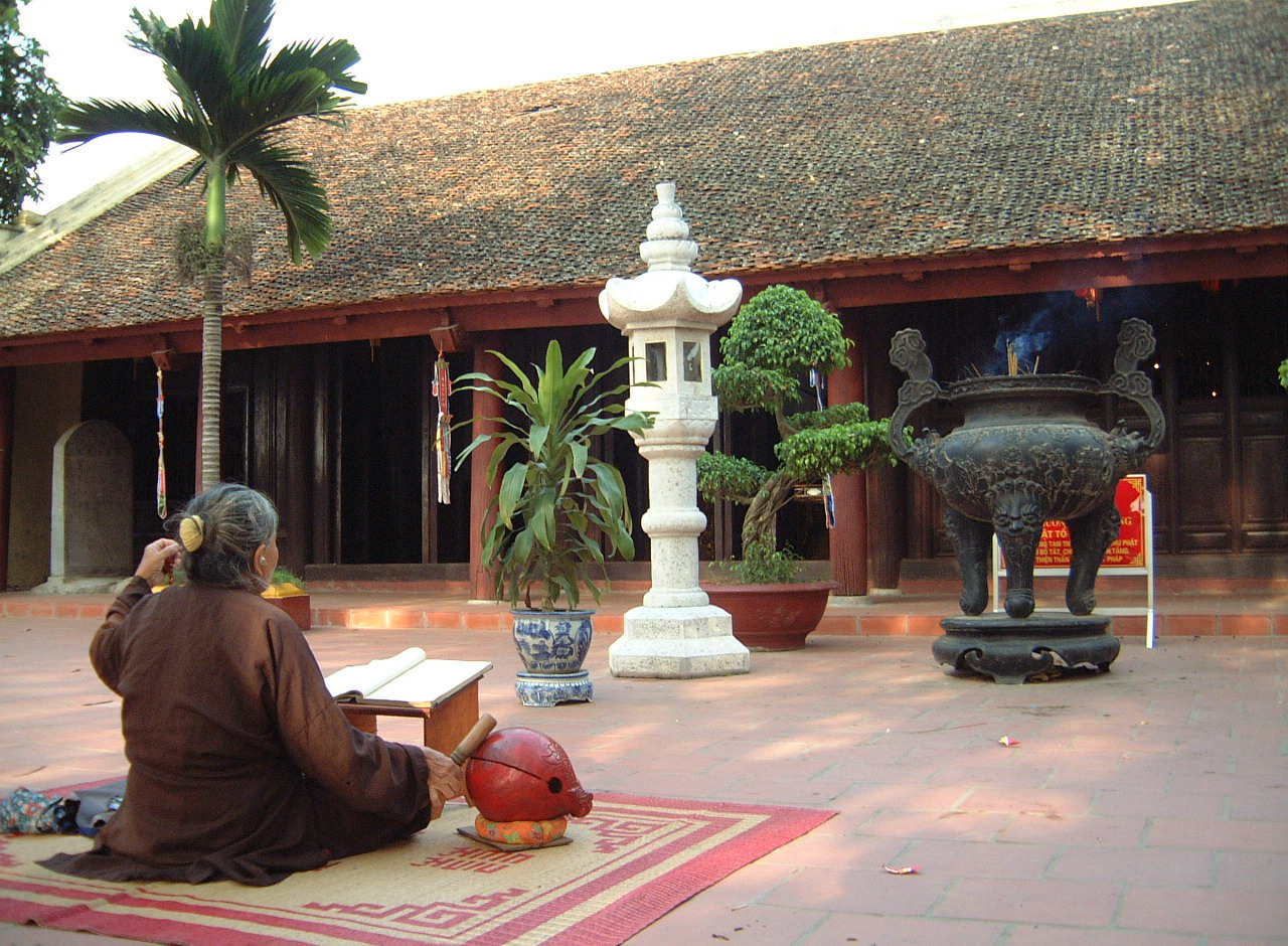 La pagode Tran Quoc (pagode de la Défense du Pays) Ha Noi